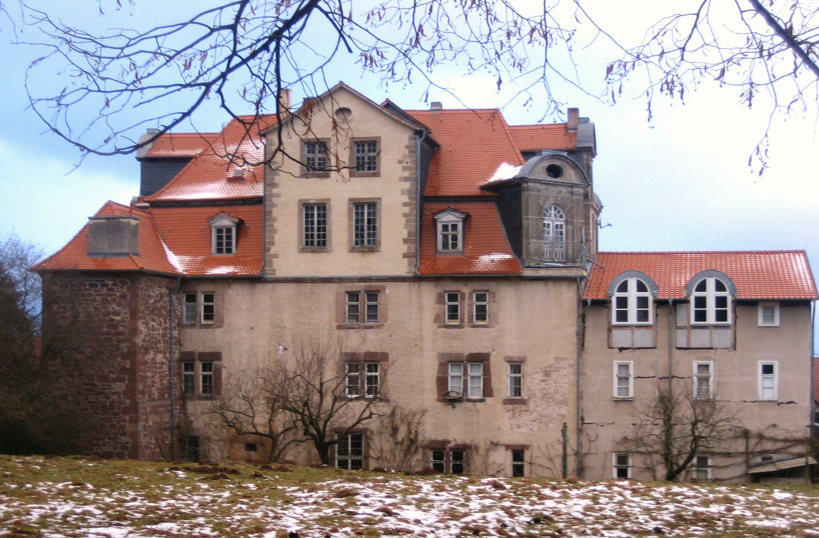 Schloss Riede in Riede (Bad Emstal) in Hessen, 2006, von Westen (der Gartenseite) gesehen